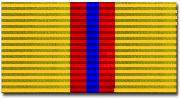 Inkerin Valkoisen Muurin kunniamerkkinauha.